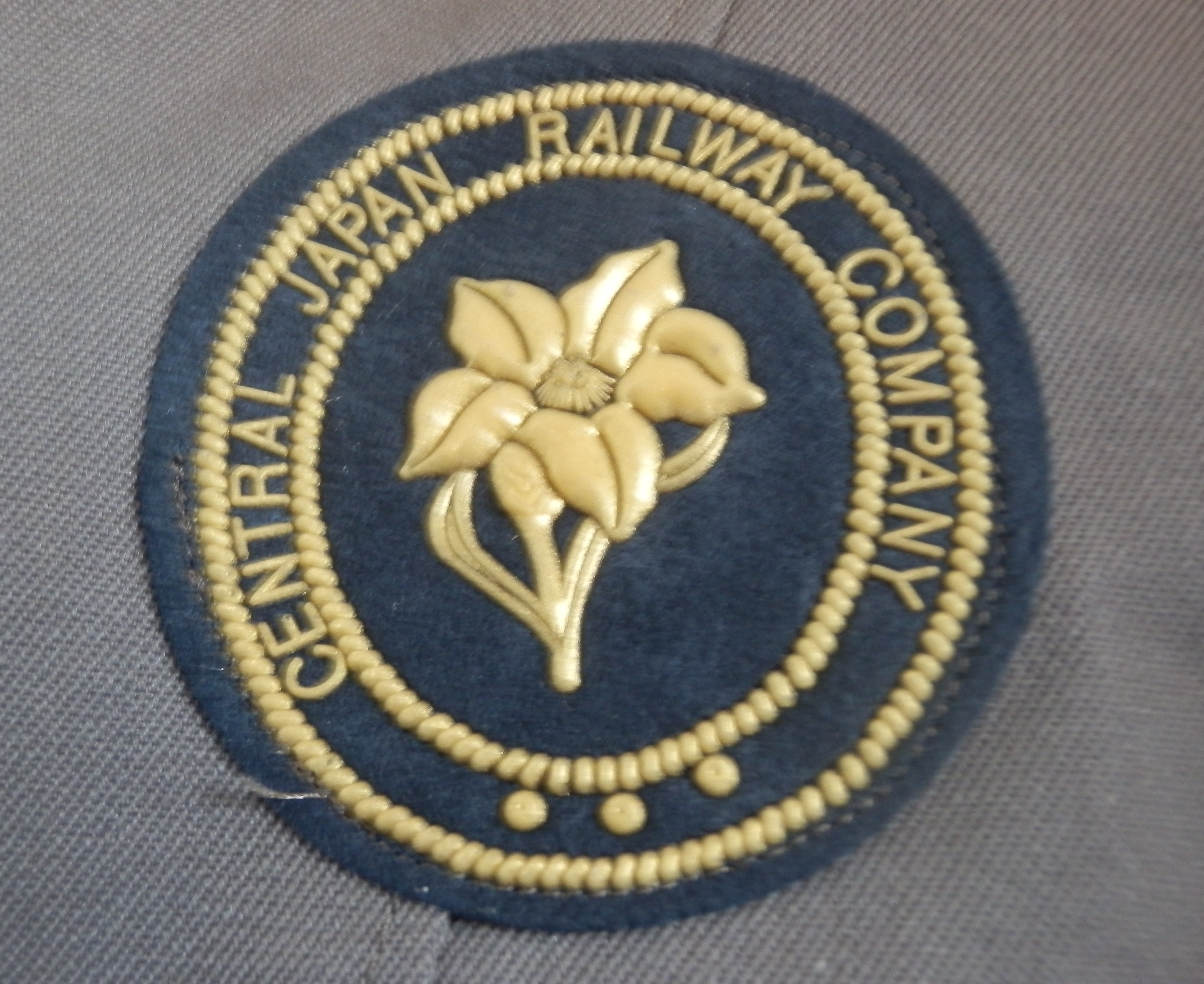 「竜胆」をあしらったJR東海の社章。知人のJR職員に頼んで撮らせてもらった。